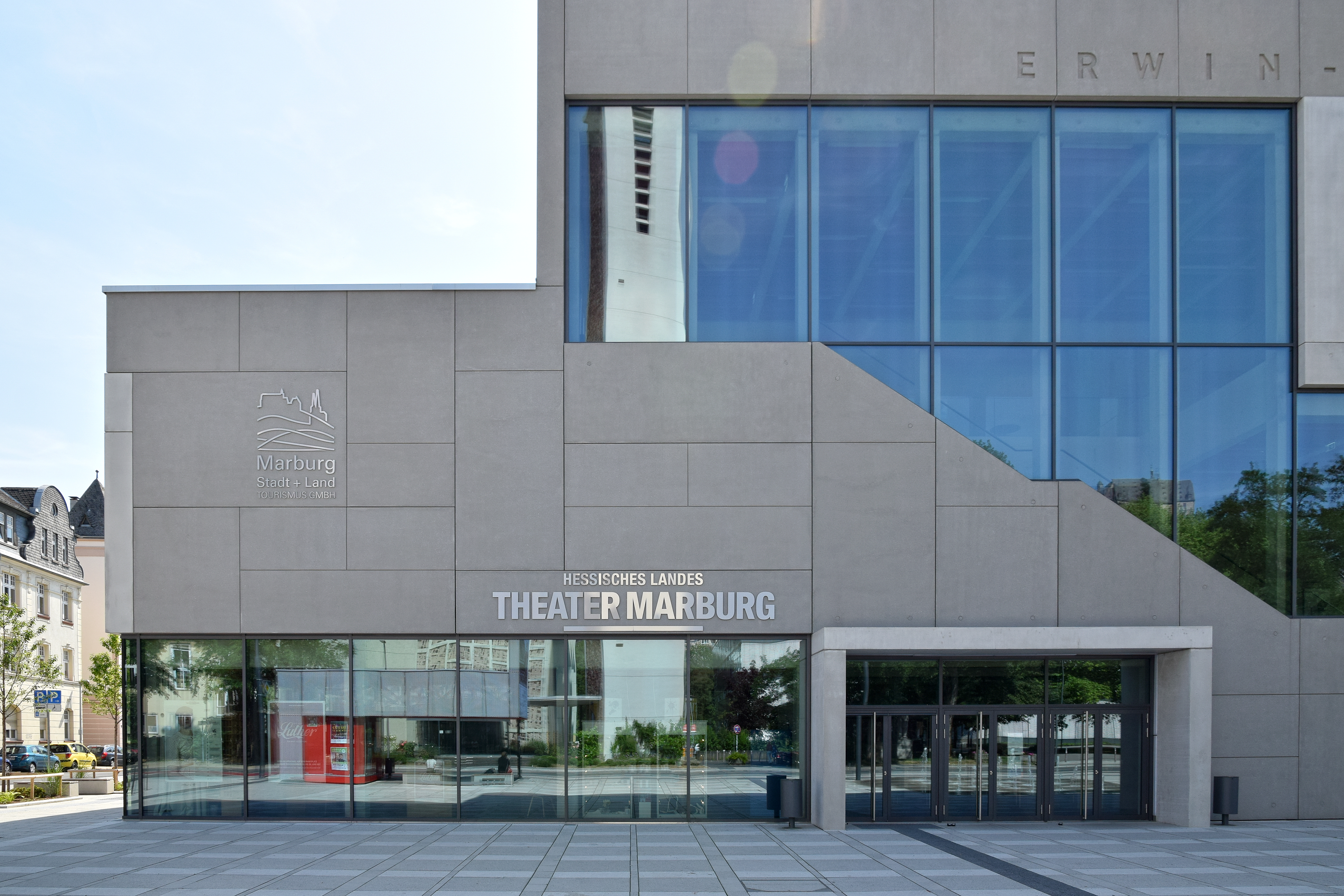 Hessisches Landestheater Marburg in der Stadthalle ("Erwin-Piscator-Haus"). Reflexion des Turmes der St.-Peter-und-Paul-Kirche.